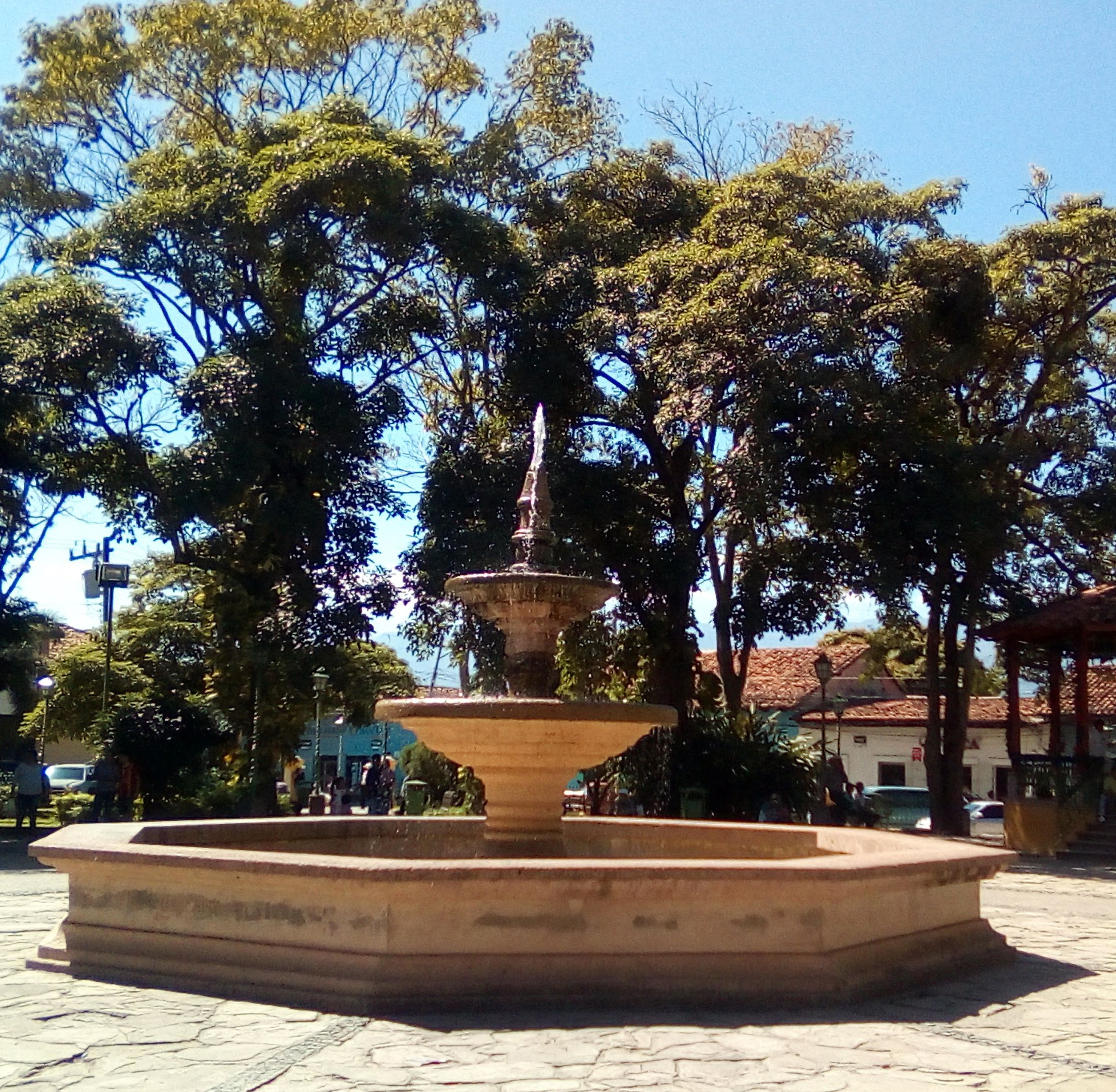 Replica de la fuente de Comayagua del siglo XVI.